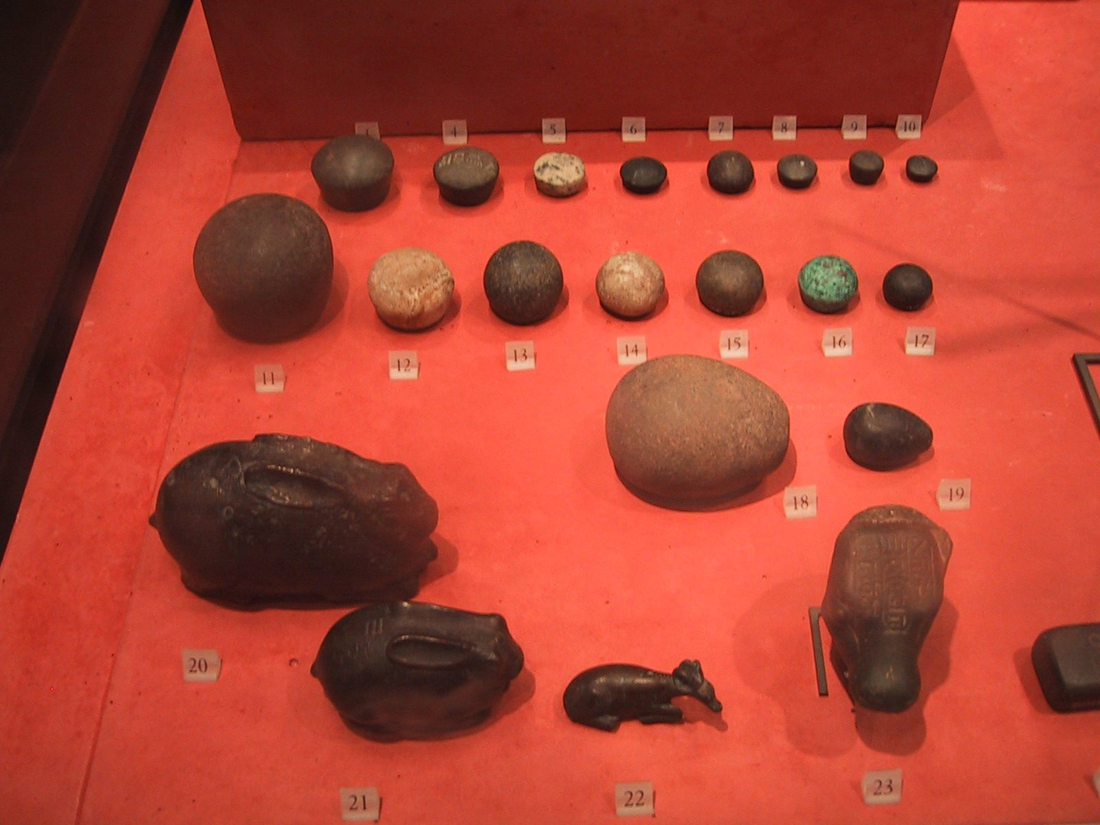 Poids et poids en forme d'animaux.